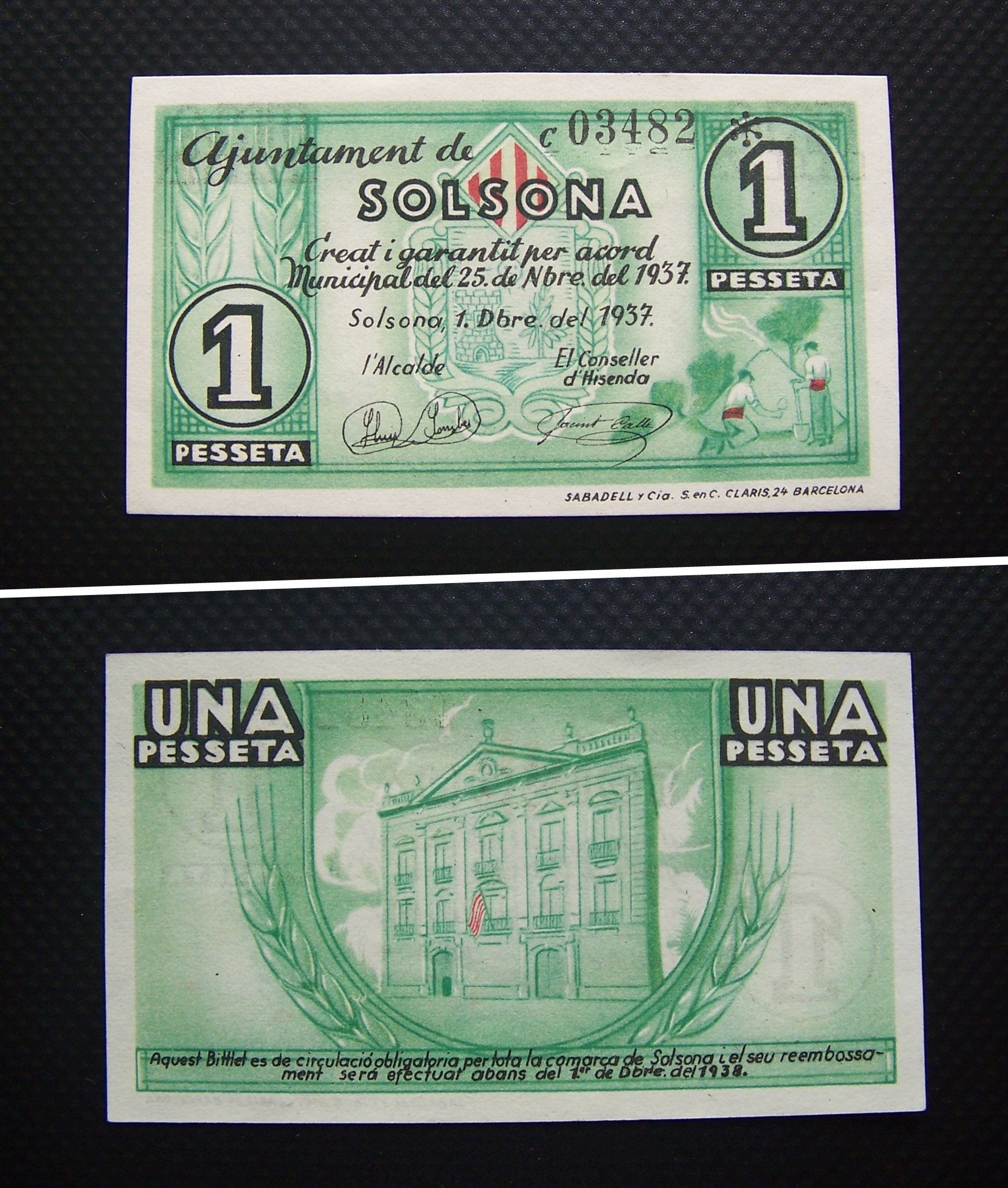 Billete local de la Segunda República Española, 1 peseta, Solsona, 1 de diciembre de 1937